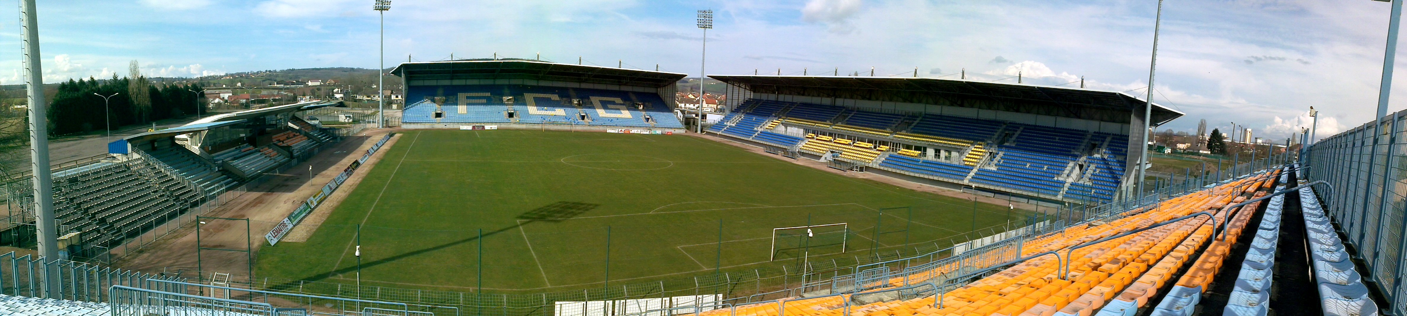 Panoramique depuis la tribune Est du stade Jean Laville de Gueugnon (71)